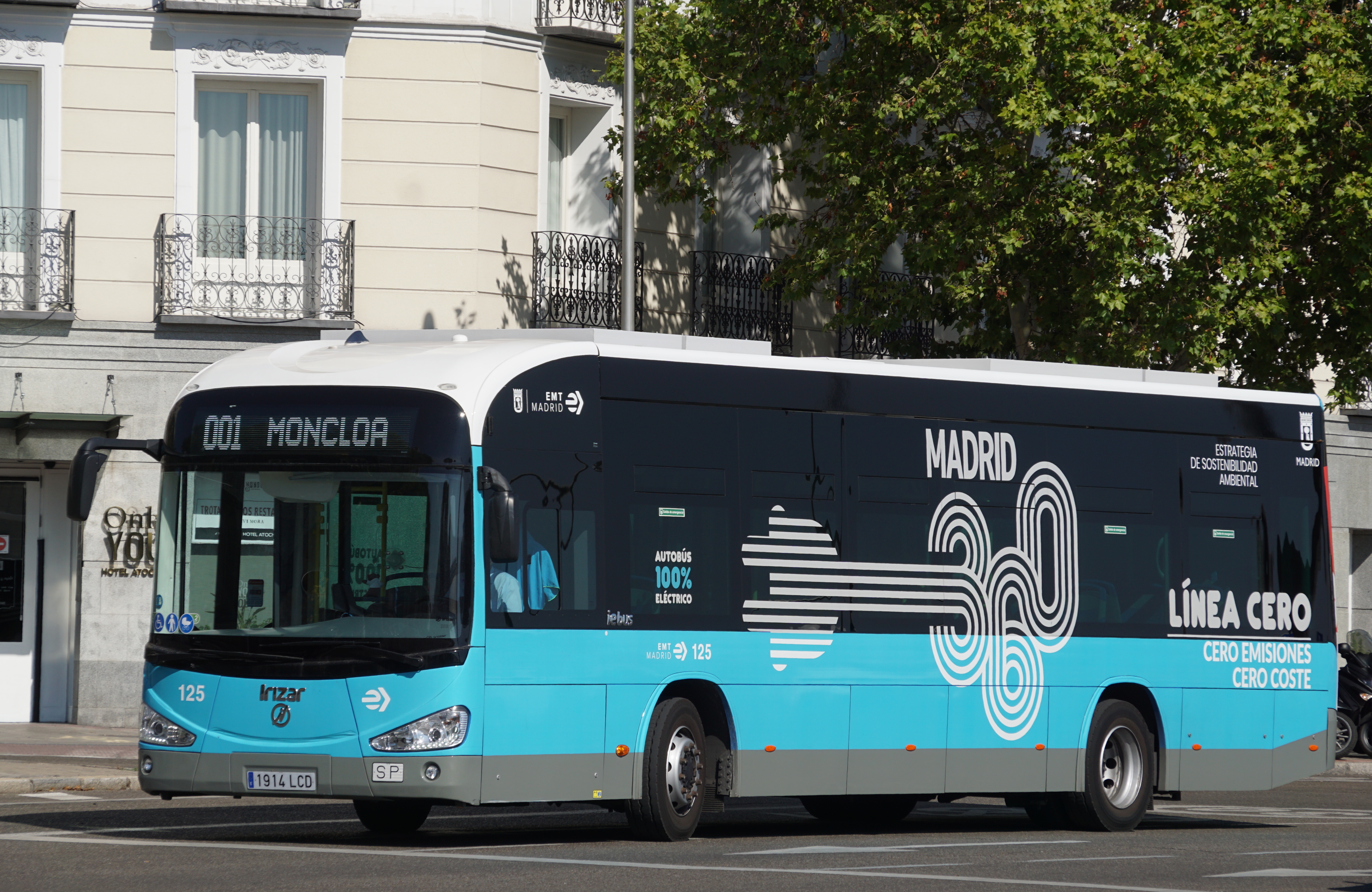 001 EMT Madrid junto a la estación de Atocha, agosto 2020